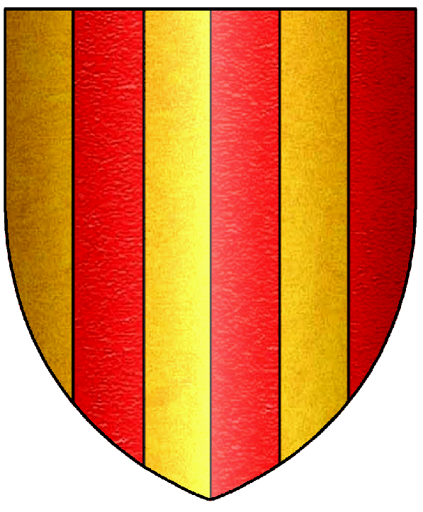 Blason de la Maison d'Amboise